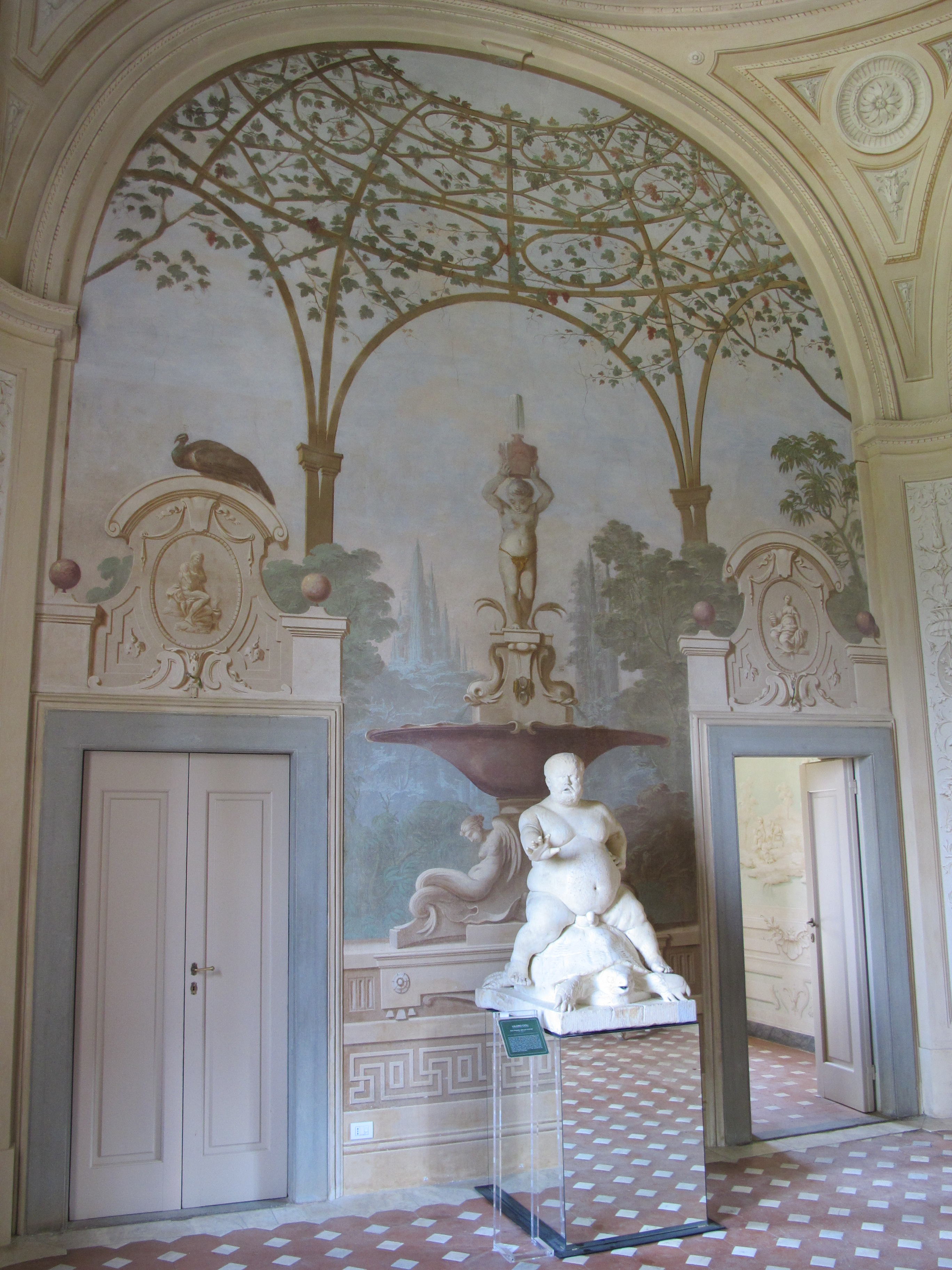 Kaffeehaus di boboli, interno